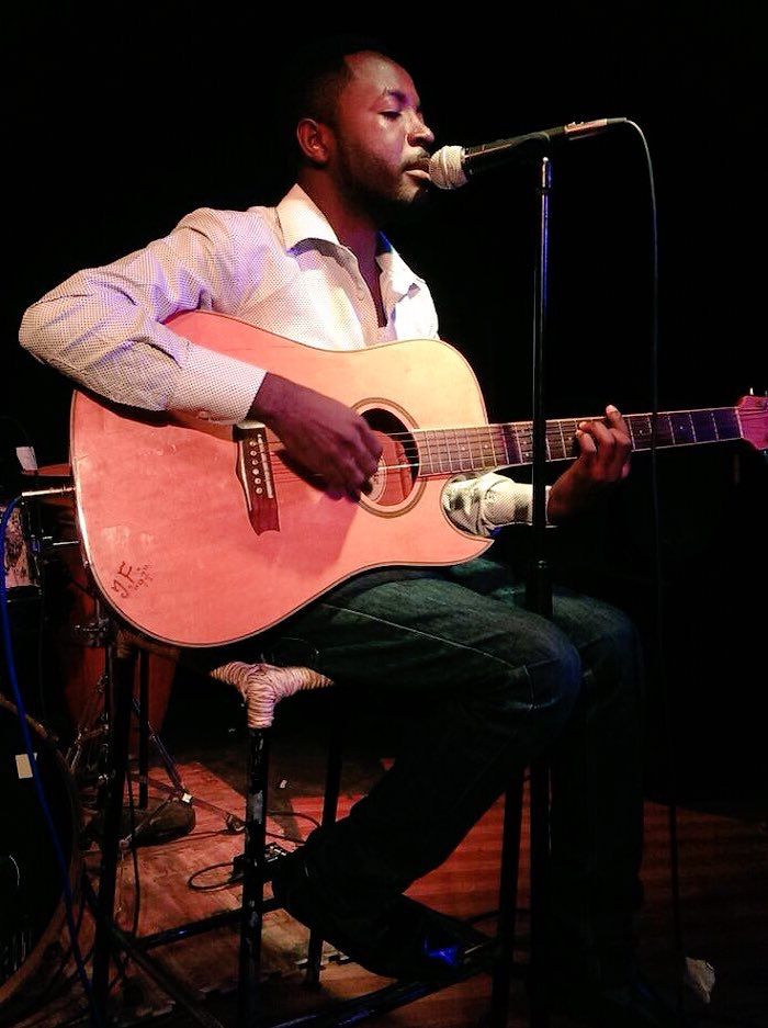 Kreyòl ayisyen : Sa se Atis Constant ki tap pefome an 2015 nan yon aktivite